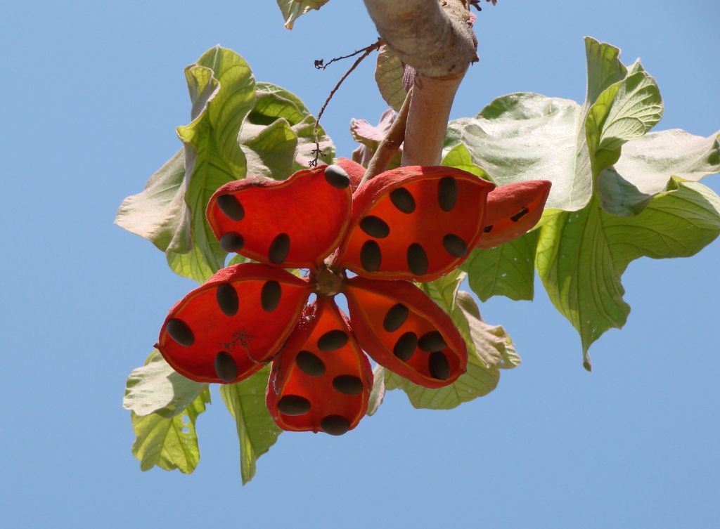 Sterculia striata - MALVACEAE - Asa Norte - Brasília - Distrito Federal - Brasil.